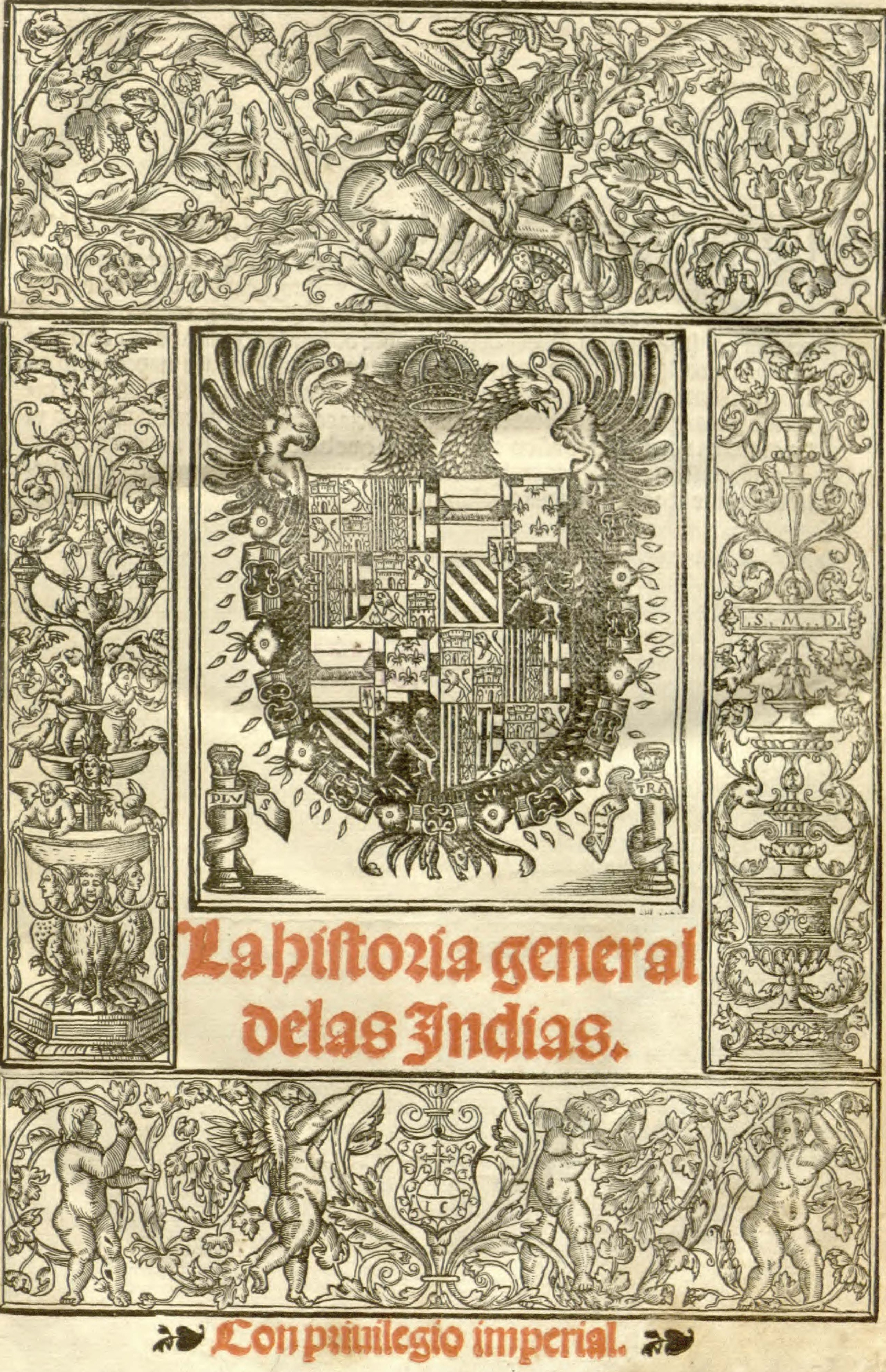 Portada del libro: Historia general de las Indias Capitan Gonzalo Hernandez de Oviedo y Valdez (1536)